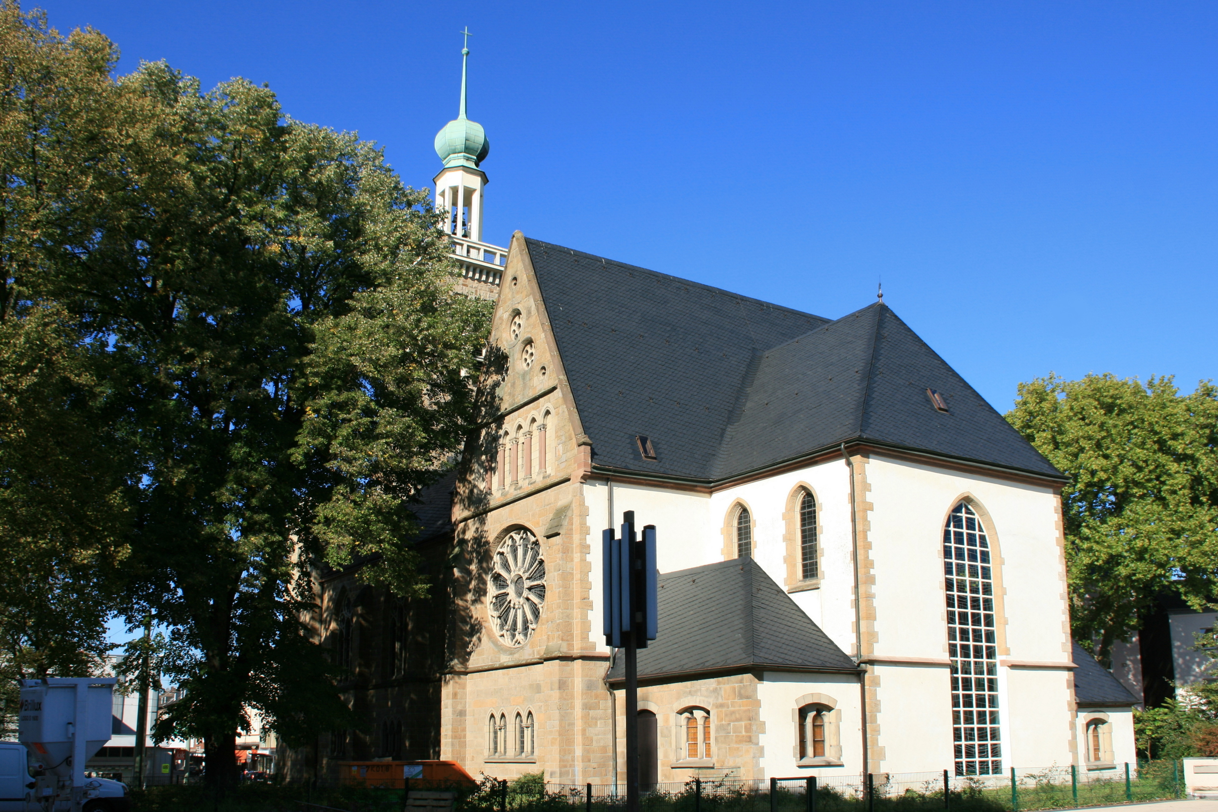 Evangelische Johanneskirche, Richard-Wagner-Straße in Herne-Eickel